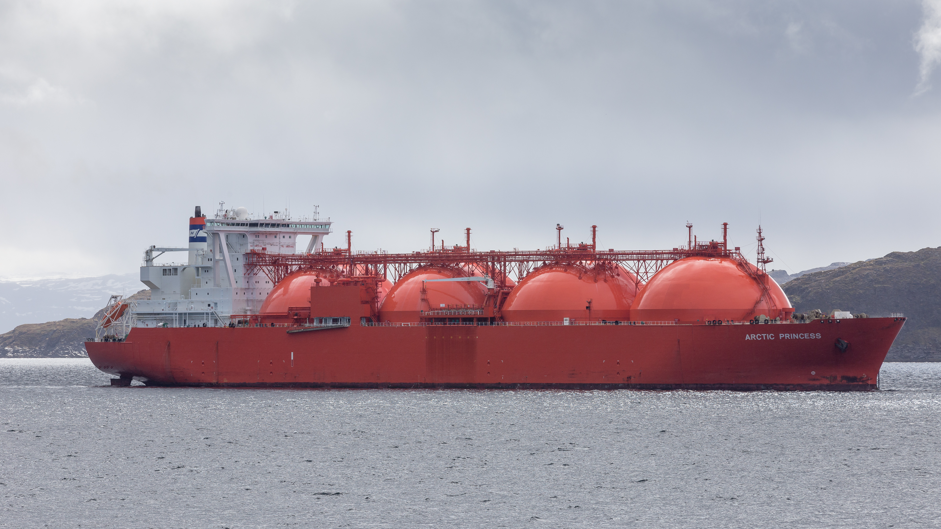 LNG Tanker ARCTIC PRINCESS vor Hammerfest (N) - Juni 2015